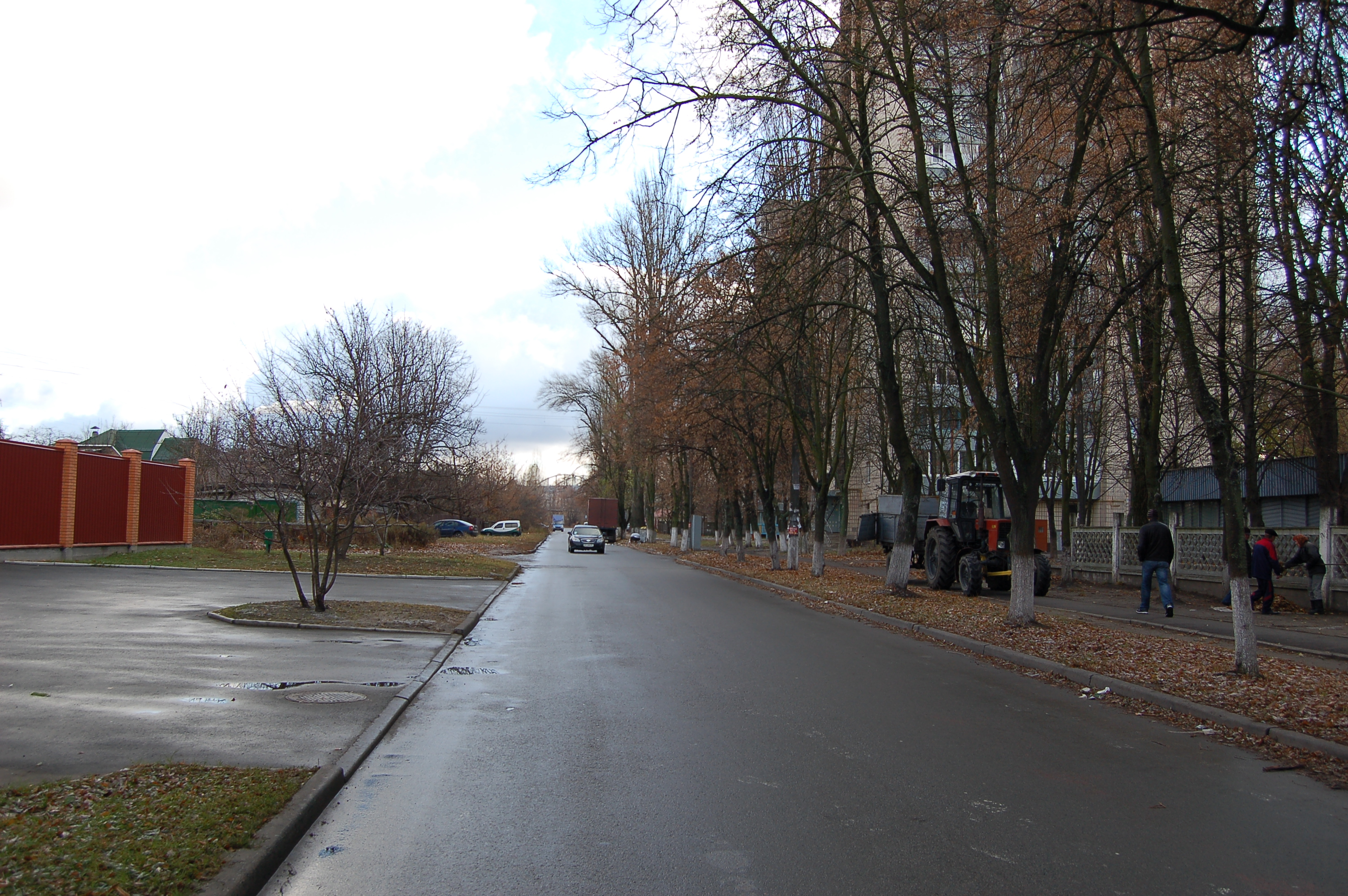 Приборный переулок в Киеве